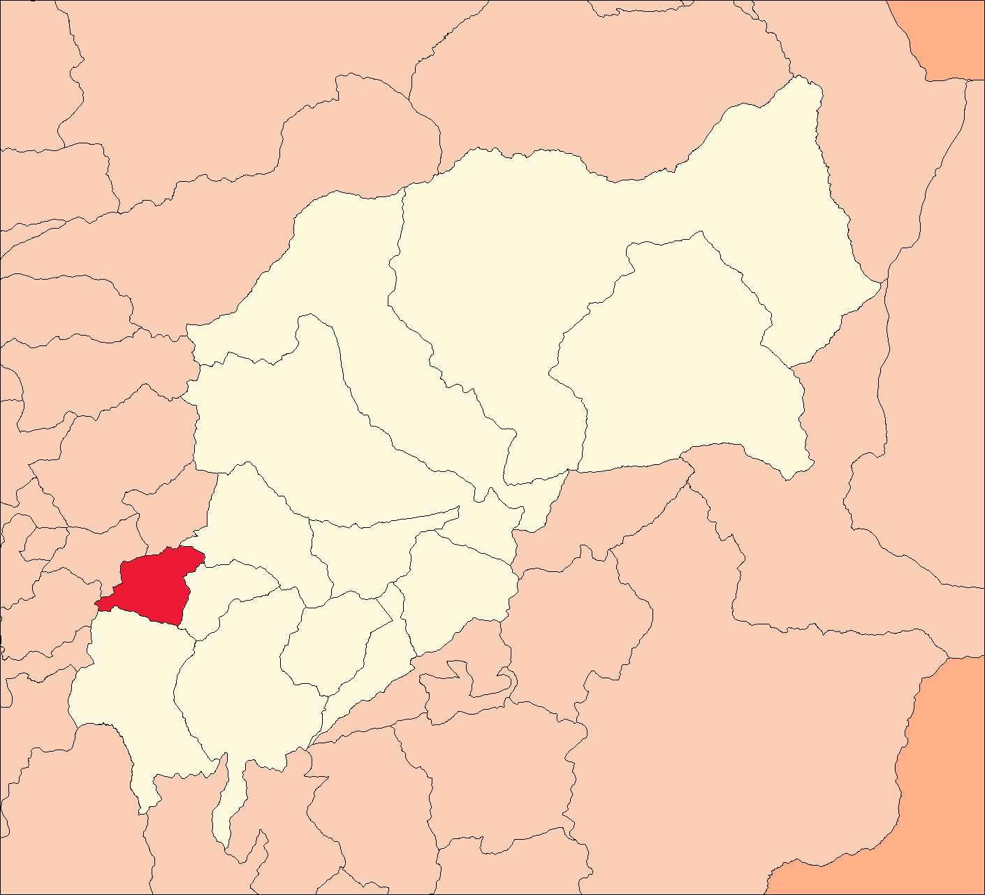 Área del distrito de Yacus.